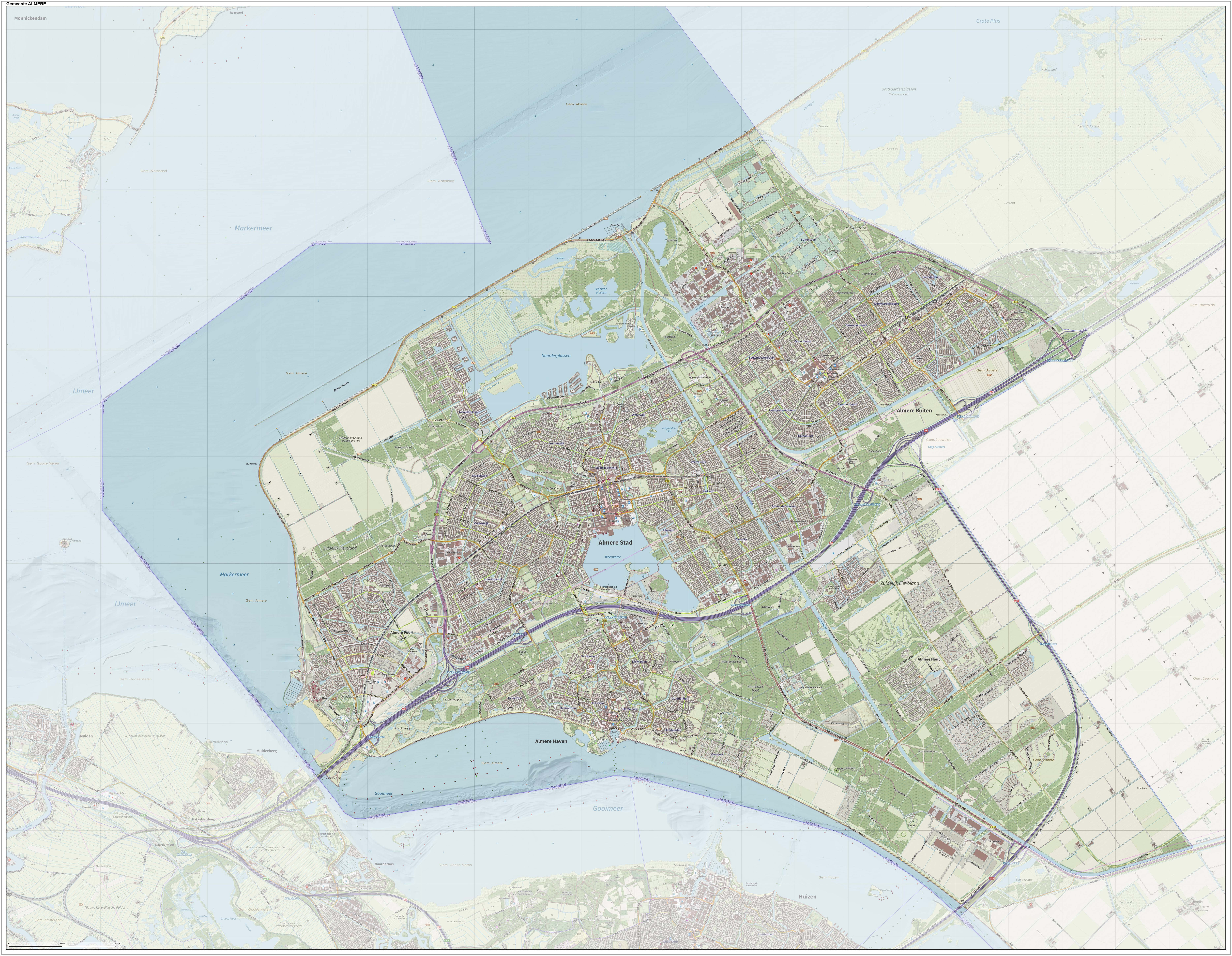 Topografische gemeentekaart. Resolutie: 400 pixels/km. Kaartbeeld samengesteld uit de open geodata van de Top10NL en Top25namen (Kadaster), Creative Commons-BY licentie. Gebouwvlakken uit open geodata BAG extract. Wegen uit de OpenStreetMap, OpenStreetMap community. Reliëfschaduw uit de Actuele Hoogtekaart AHN2. Samenstelling en kleurenschema: Jan-Willem van Aalst, met QGIS. Zie ook de Legenda.